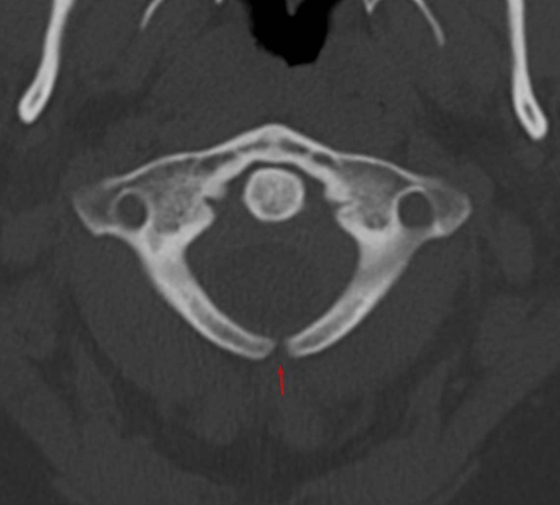 Bogenspalt am hinteren Atlasbogen in der Computertomographie.